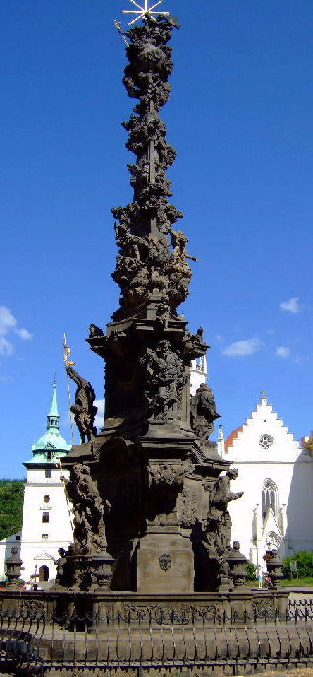 Sloup Nejsvětější Trojice v Teplicích, dílo Matyáše Bernarda Brauna z let 1718 až 1719. V pozadí vlevo děkanský kostel sv. Jana Křtitele, vpravo zámecký kostel Povýšení sv. Kříže.